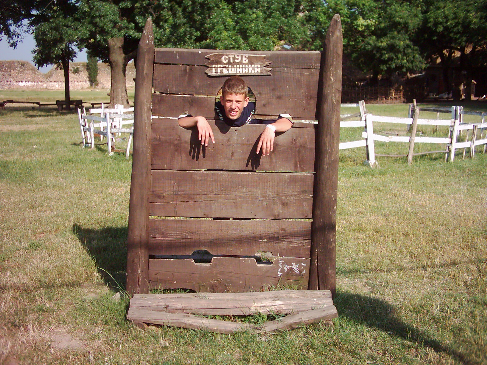 My picture. My editing. I give it (the picture) to the world 2004 године Serbian user Bonzo